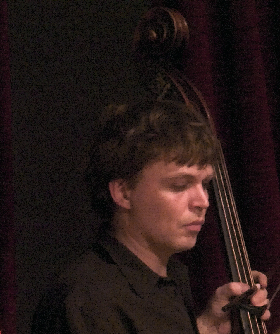 Sebastian Gramss, Jazzbassist und Komponist